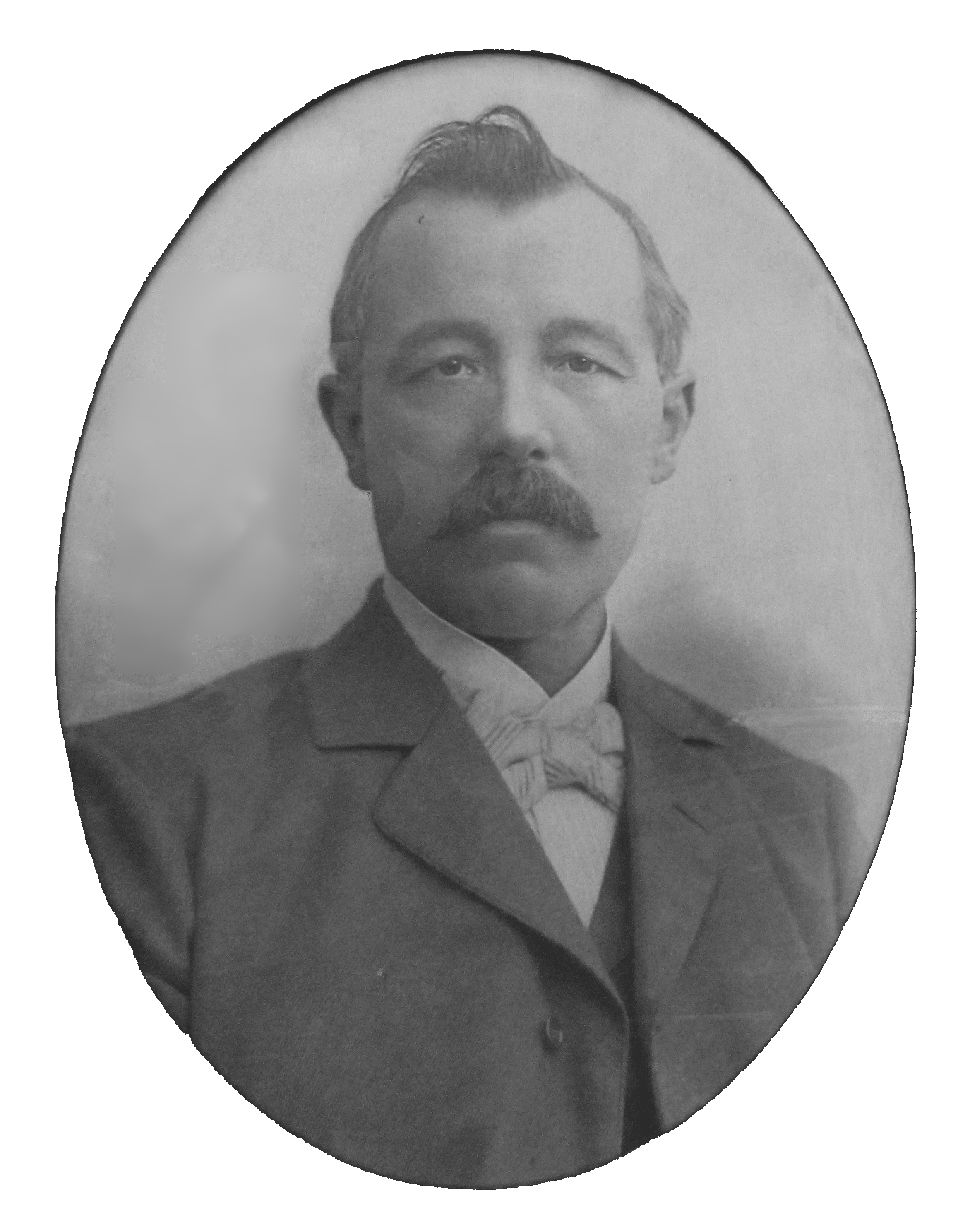 Bildinhalt: Jakob Bengel um 1875 Aufnahmeort: Idar-Oberstein, Deutschland